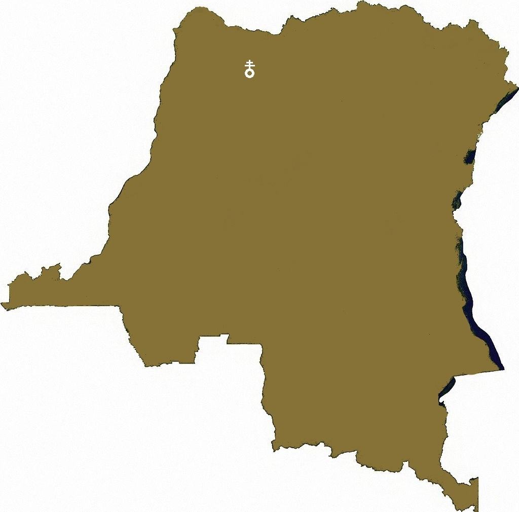 kaart congo